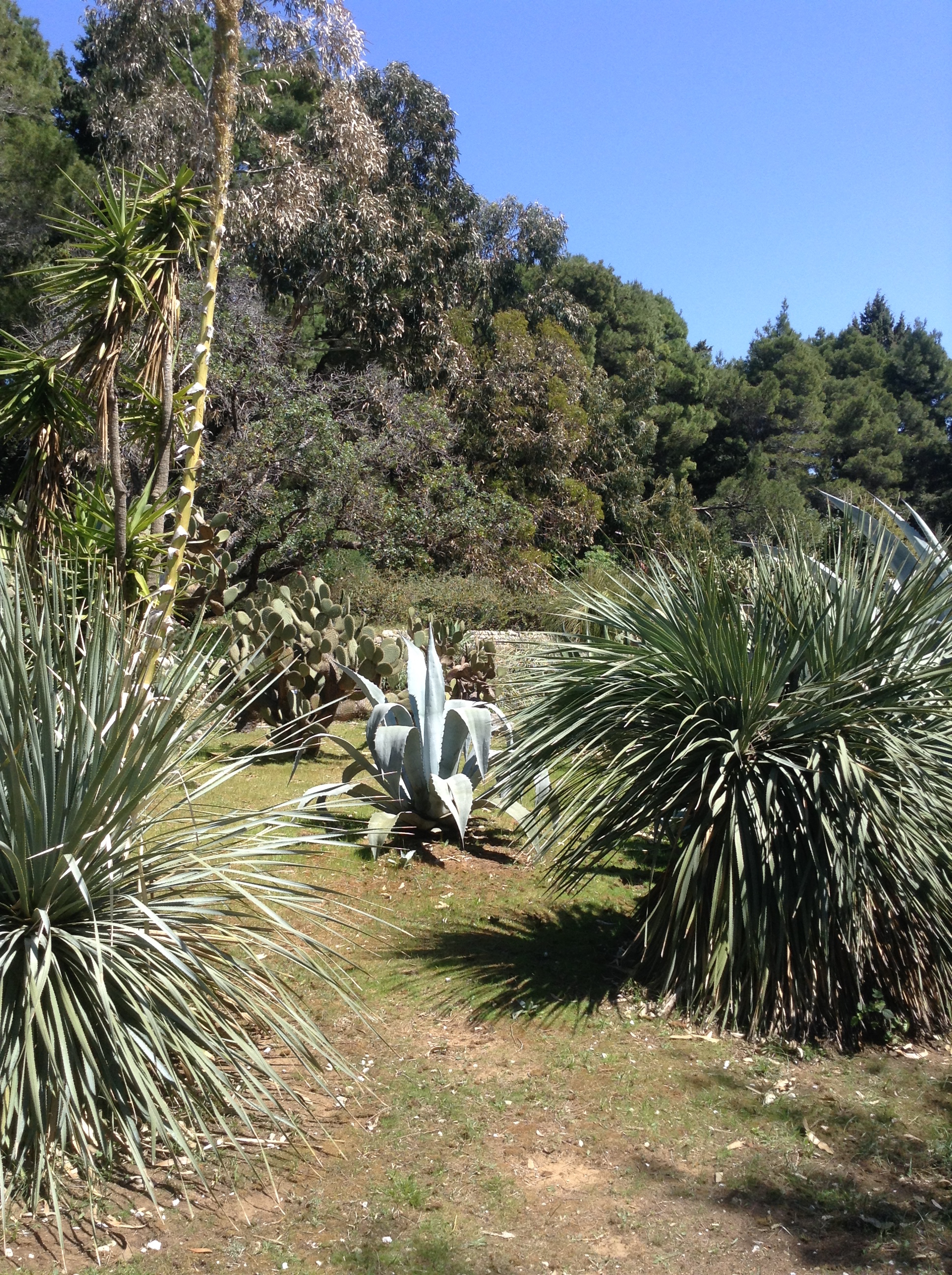 Exemple de la flore de l'île de Lokrum.